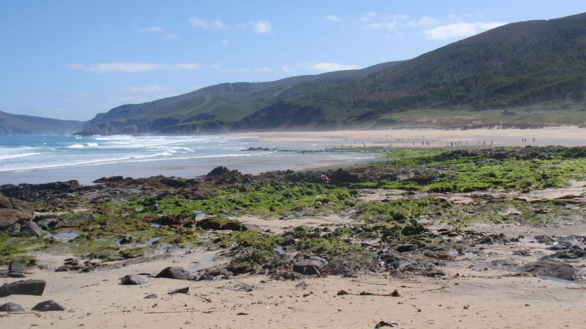 Praia de Ponços, onde se localiza a antiga Floresta Fóssil do mesmo nome